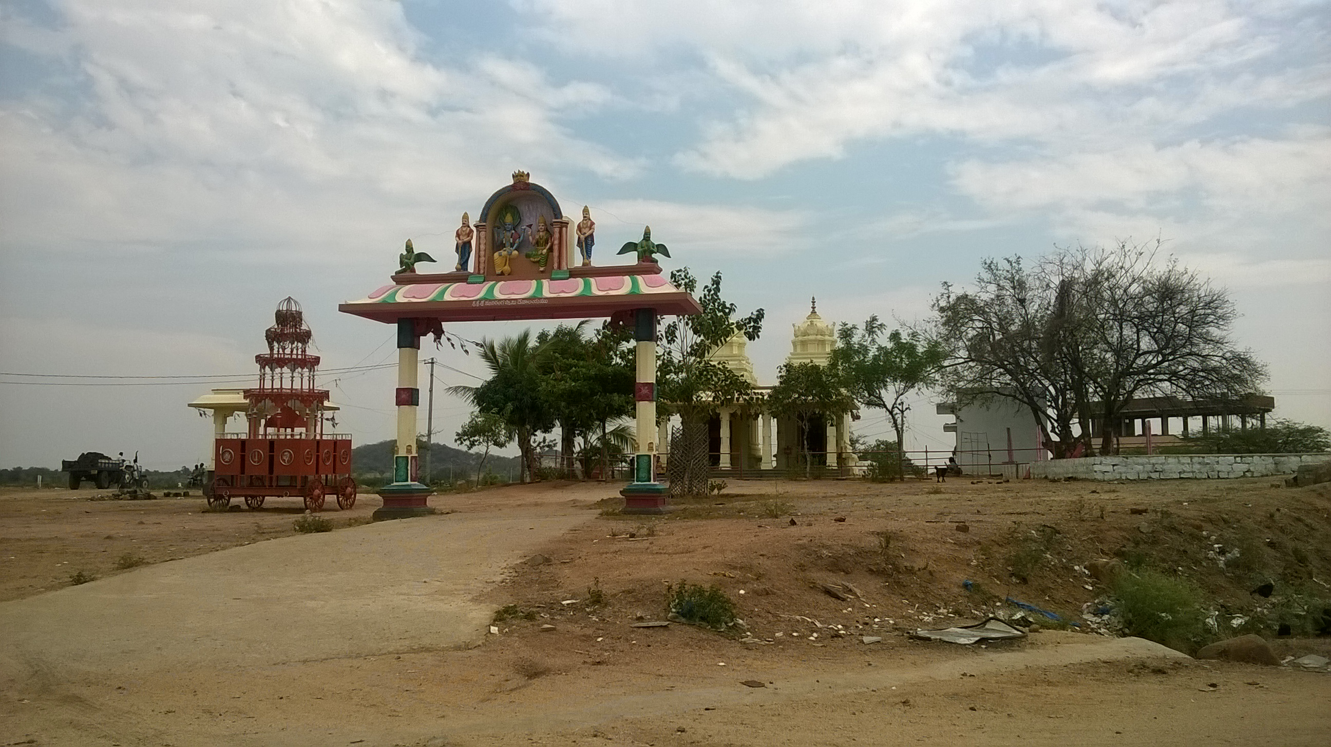 శ్రీమునిరంగస్వామి దేవాలయం, భూత్పూరు